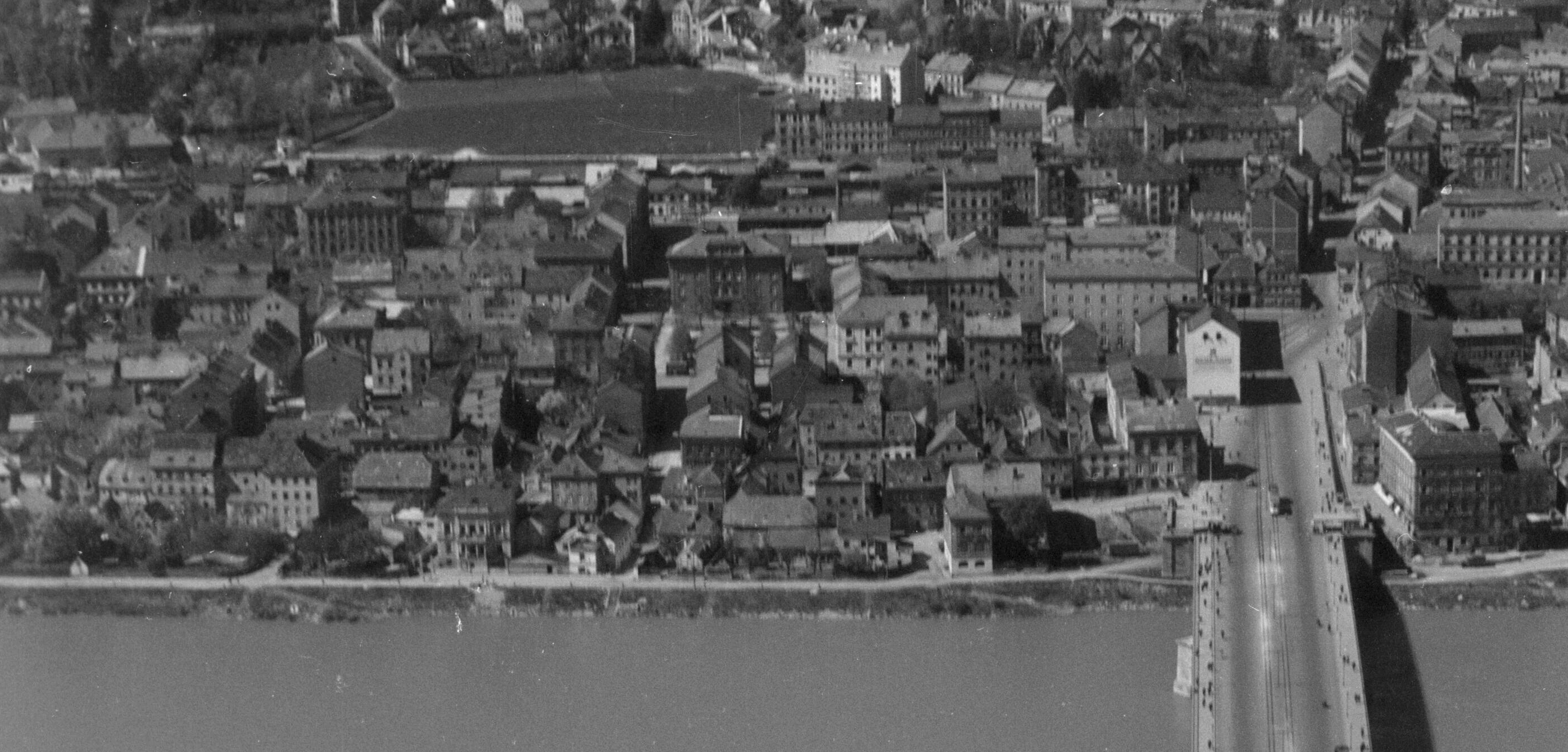 Flugbild Urfahrs von Süden mit dem Areal des heutigen Linzer Neuen Rathauses.